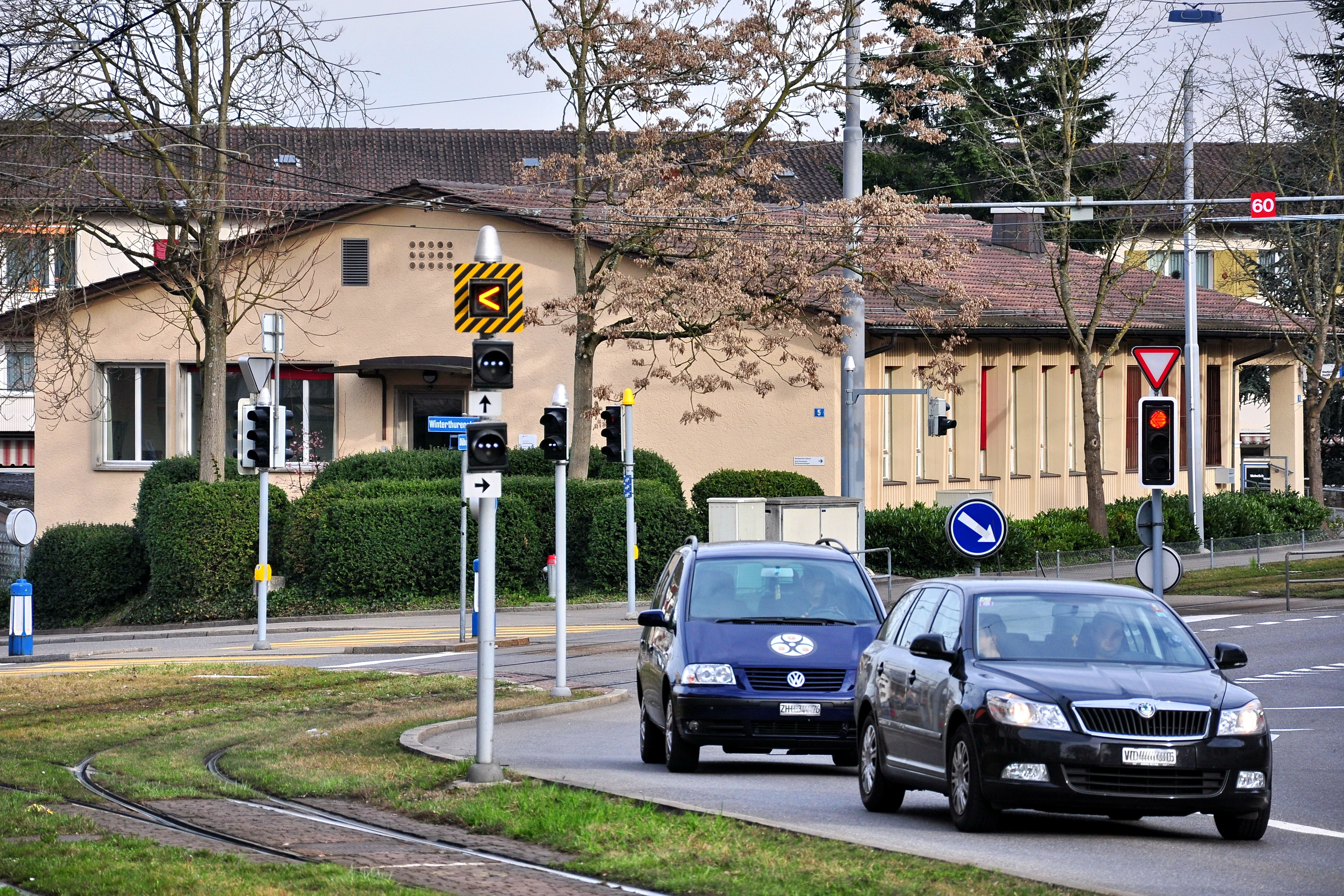 Dübendorferstrasse in Zürich-Schwamendingen (Switzerland) as seen from nearby Schwamendingerplatz